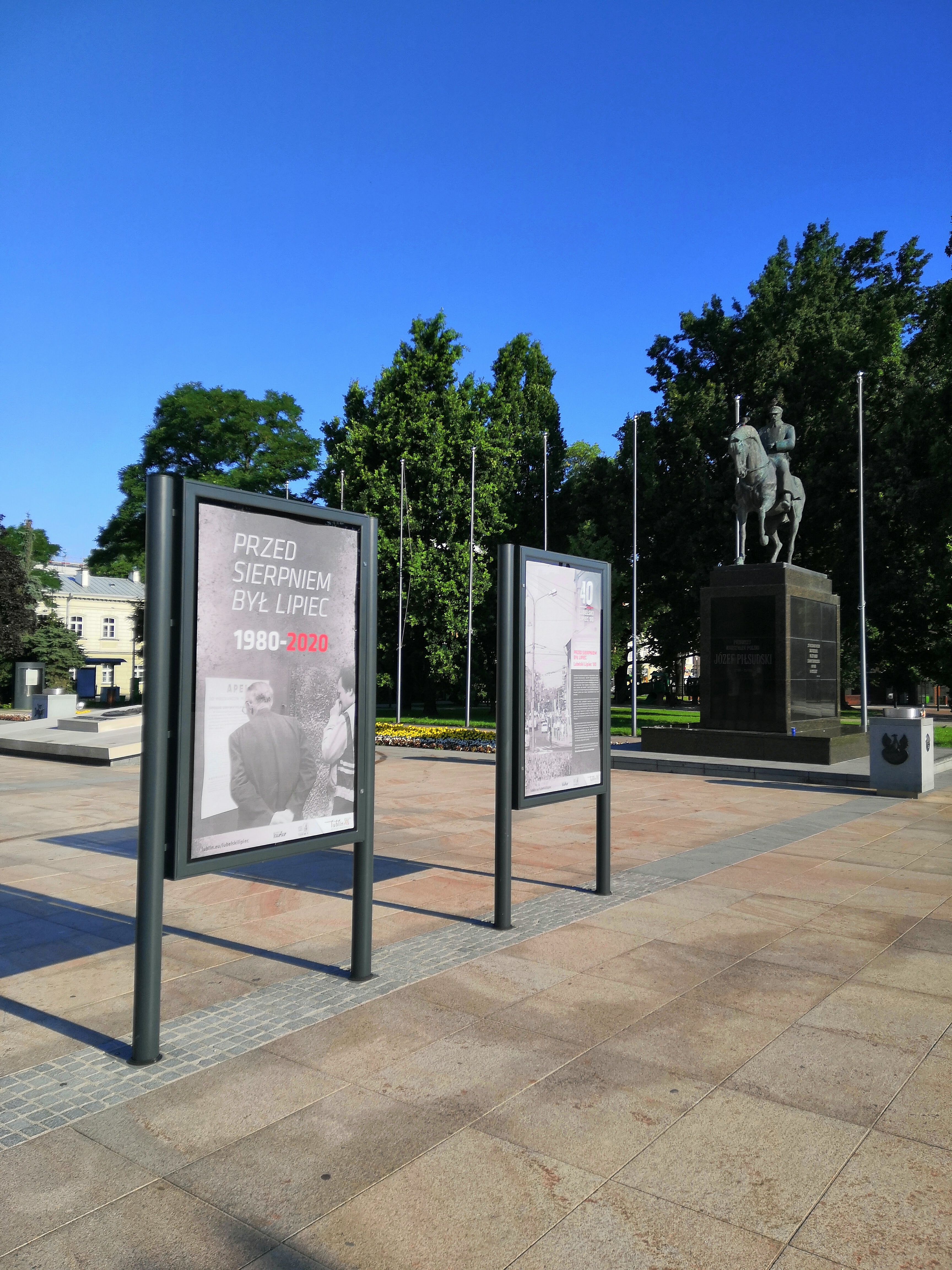 Plansza tytułowa wystawy "Przed sierpniem był lipiec” na Placu Litewskim w Lublinie. W tle Pominik Józefa Piłsudskiego.